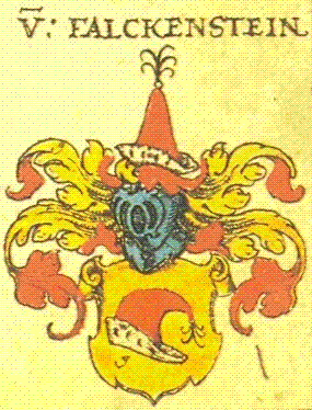 Wappen der Falkenstein unter Meißen, Tafel 164